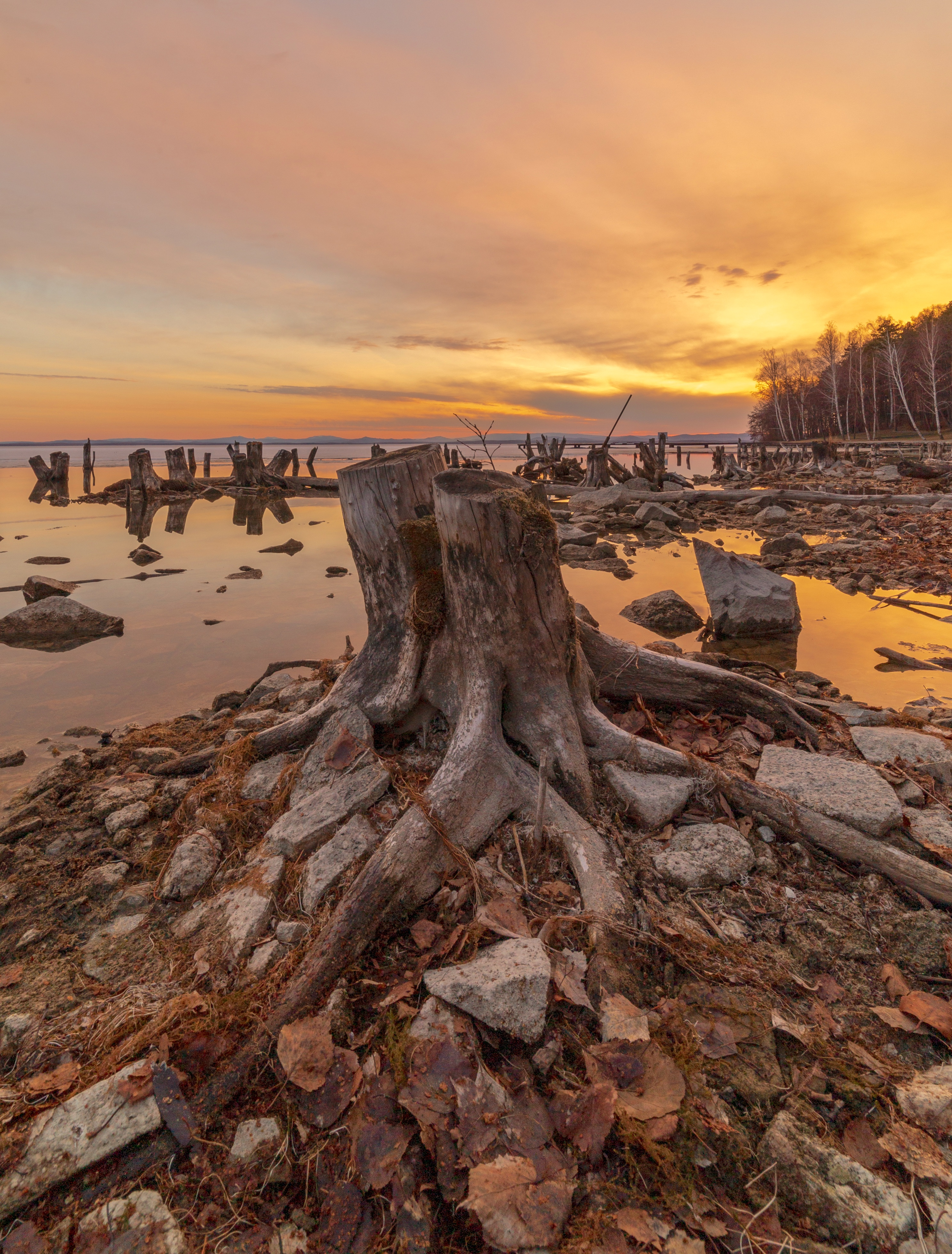 Озеро Увильды: Памятник природы расположен в области предгорий восточного склона Уральских гор в пределах границ Аргаяшского муниципального района, Карабашского и Кыштымского городских округов, Аргаяшский район, Челябинская область This image is related to the protected area of Russia number 7410018